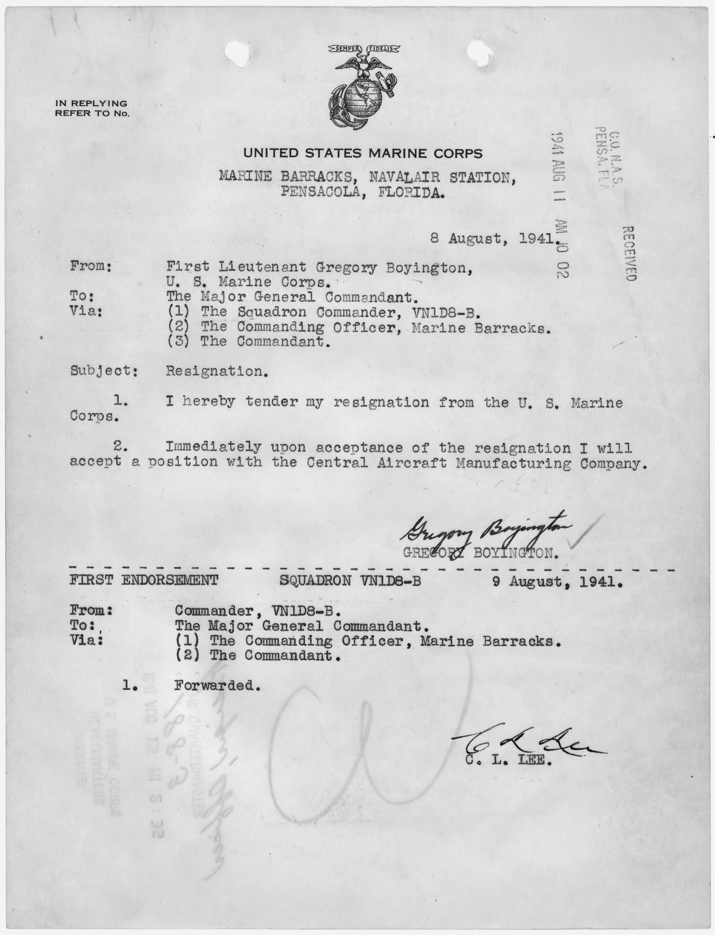 General notes: Original signature.